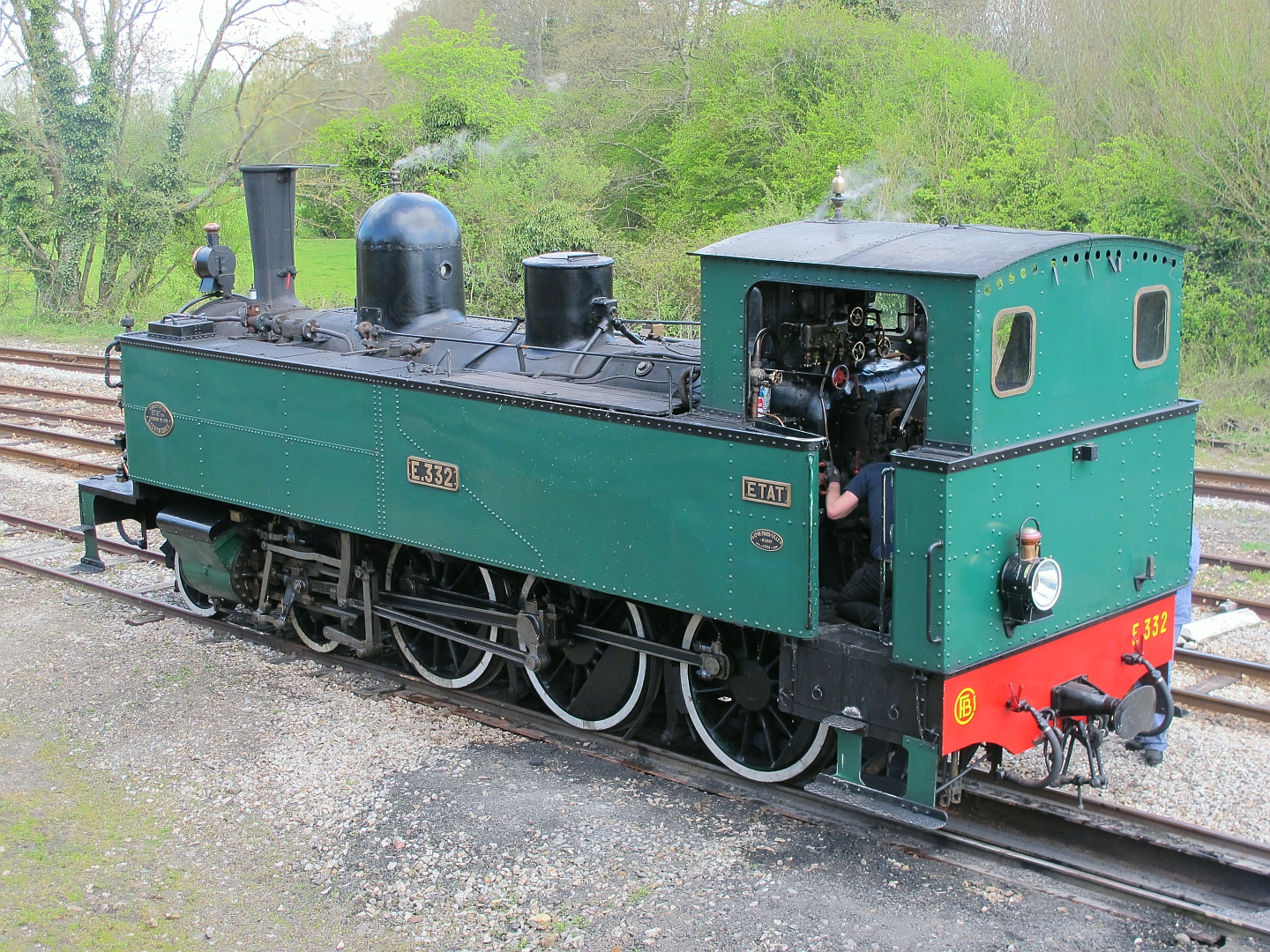 La 230 E.332 en gare de Noyelles, sur le chemin de fer de la baie de Somme le 28 avril 2013.